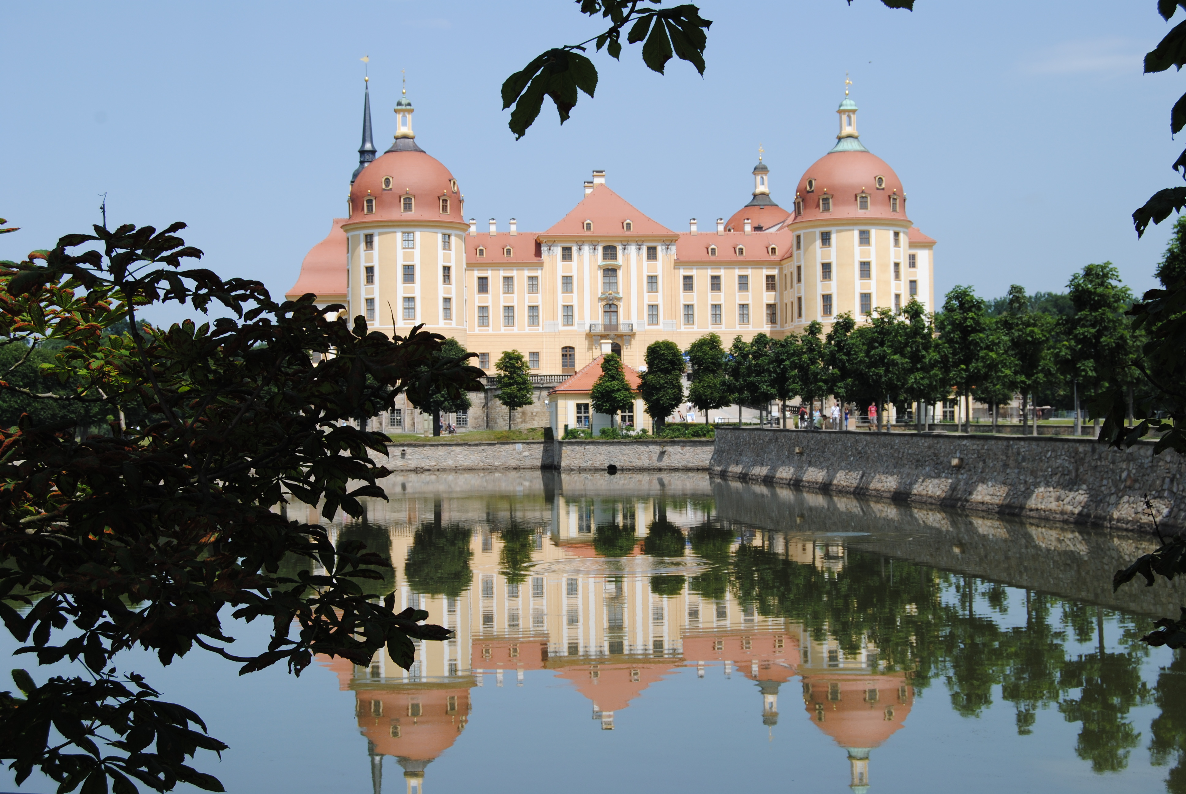 Blick von vorn auf das, von August dem Starken, König von Polen und Kurfürst von Sachsen, erbaute Jagdschloss Moritzburg. Es liegt nahe der Landeshauptstadt Dresden in einem verwunschenen Wald- und Teichgebiet und beherbergt wunderbare Ausstellungen. Adresse: Staatliche Schlösser, Burgen und Gärten Sachsen g GmbH Schloss Moritzburg und Fasanenschlösschen 01468 Moritzburg